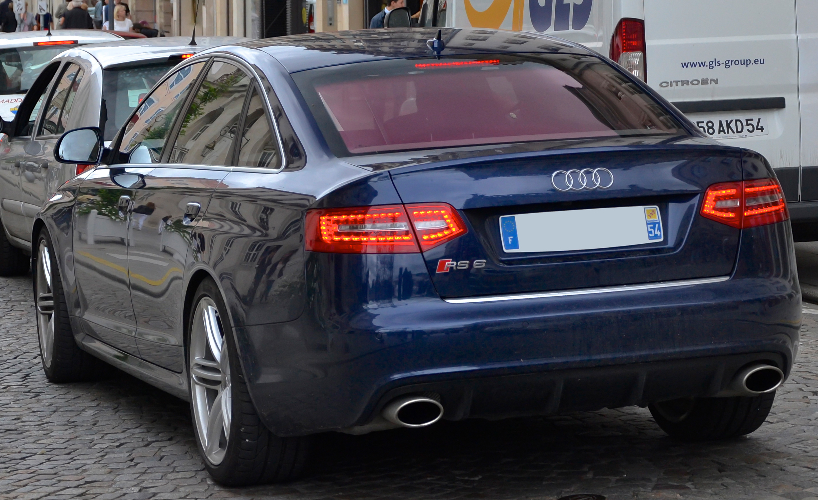 Audi RS6